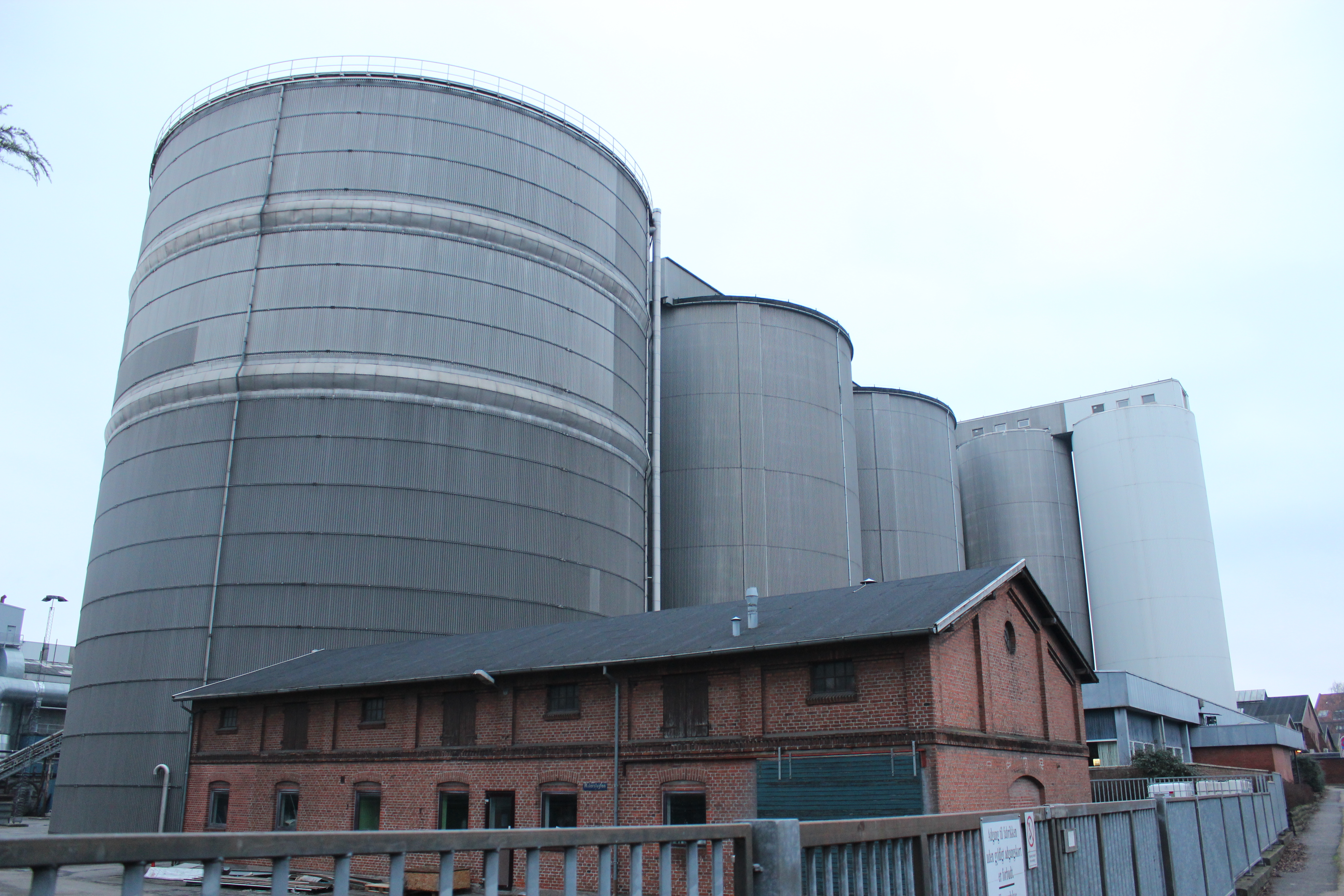 Siloer på Nykøbing Sukkerfabrik